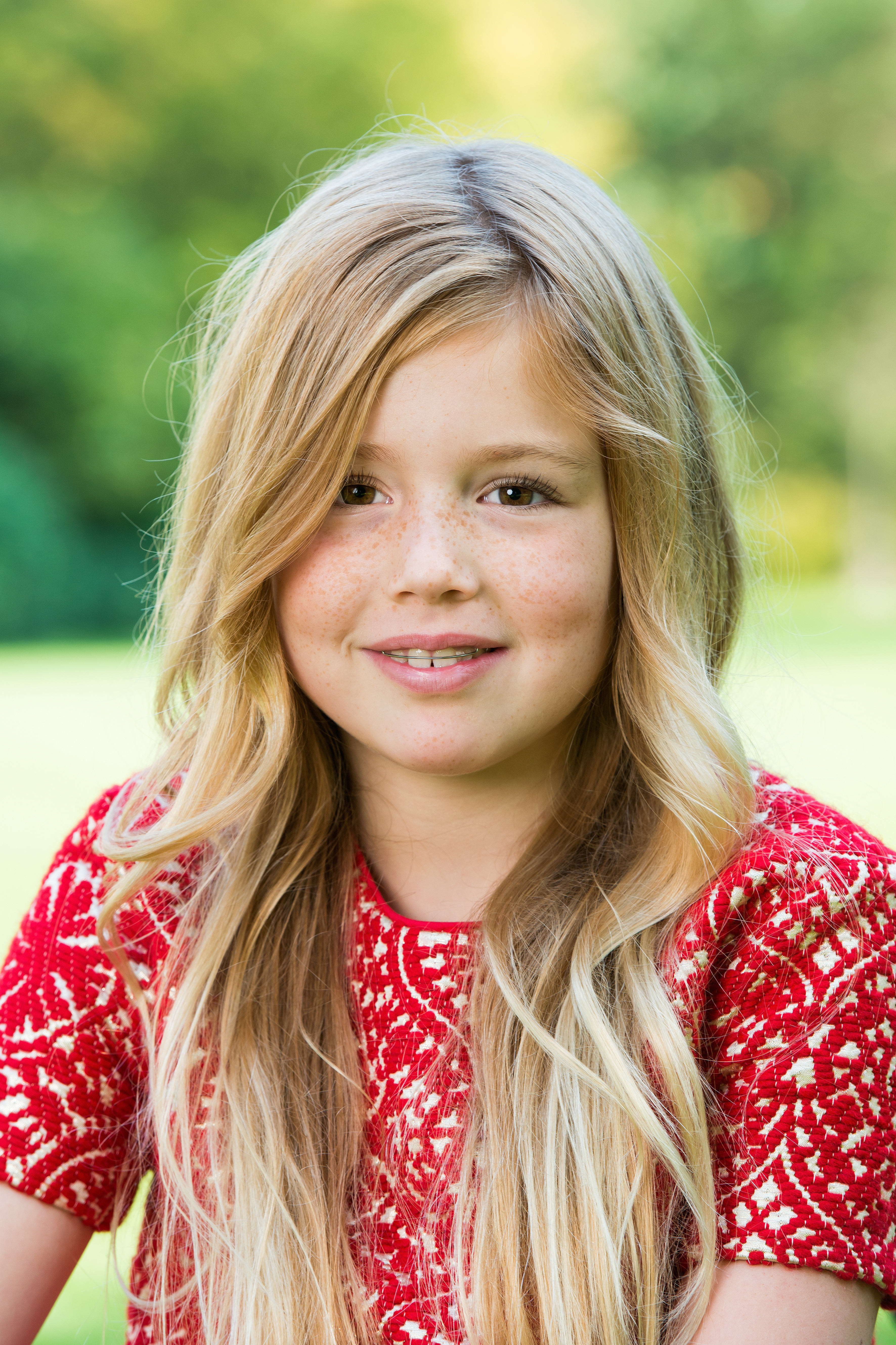 Prinses Alexia. Wassenaar, najaar 2014: Prinses Alexia.